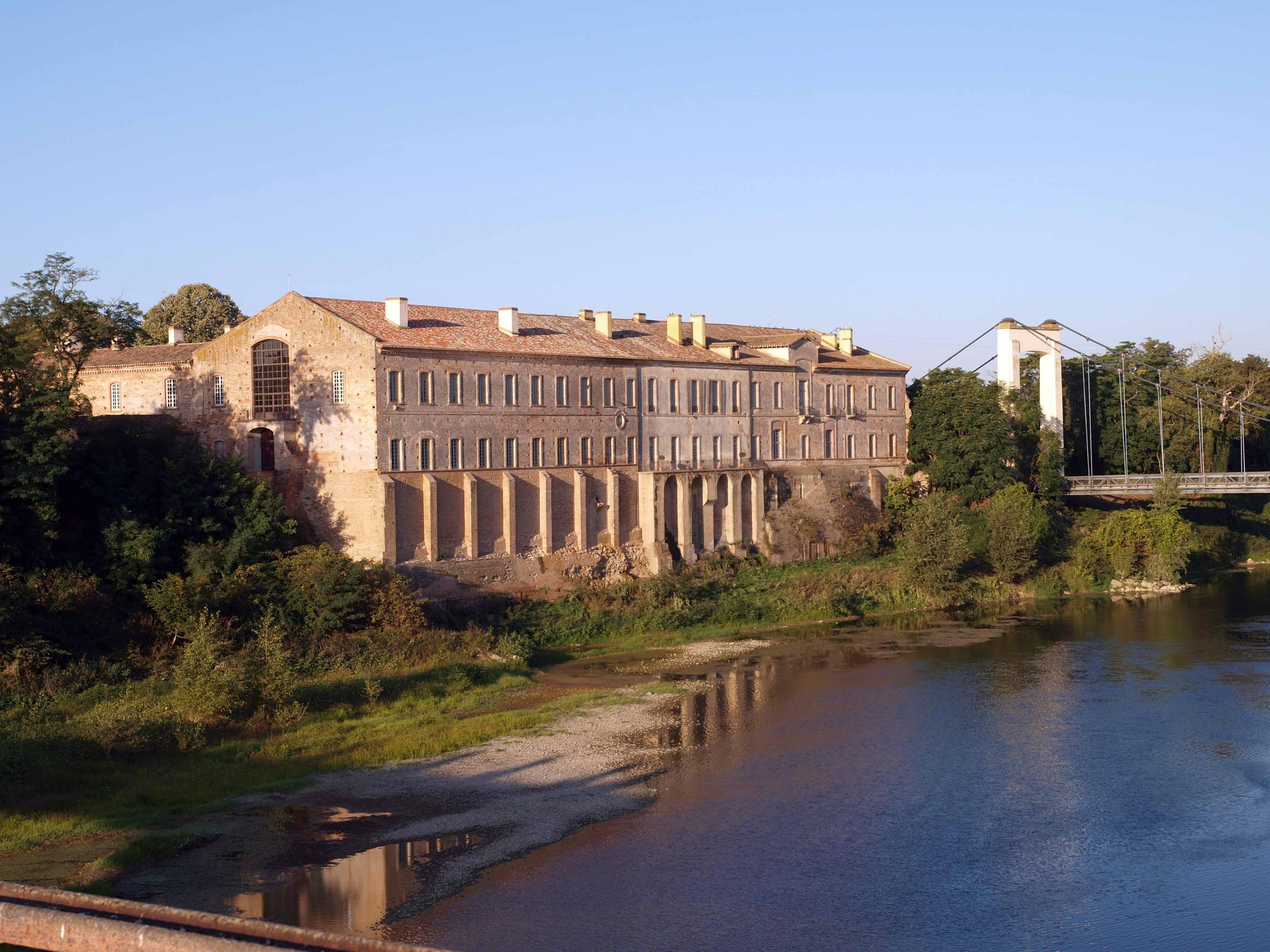 Abbaye de Belle perche - Côté Garonne